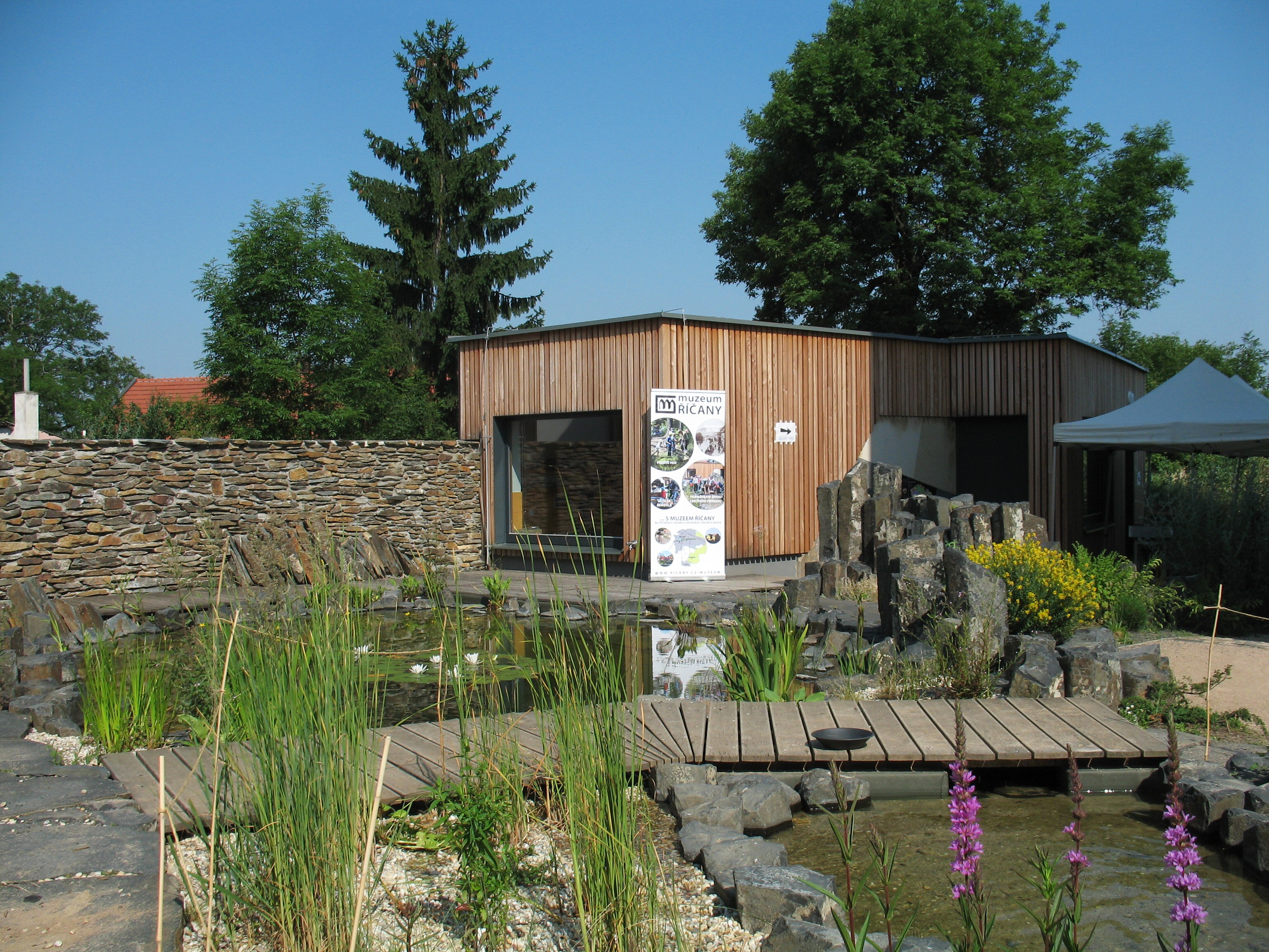 Objekt dílny a laboratoře